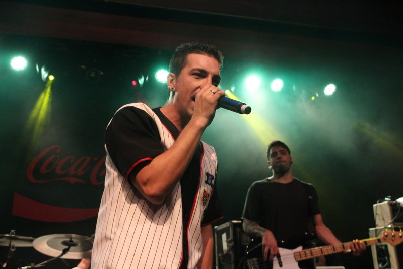 Di Ferrero-020